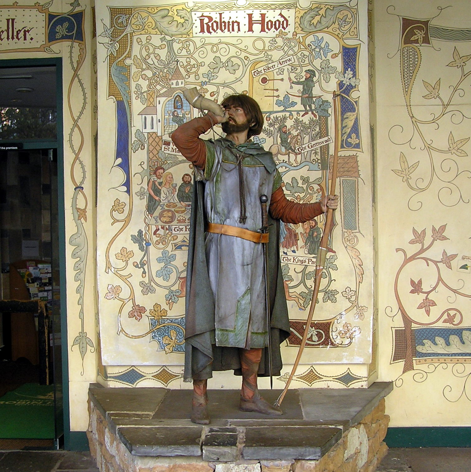 Tales of Robin Hood. Ноттингем